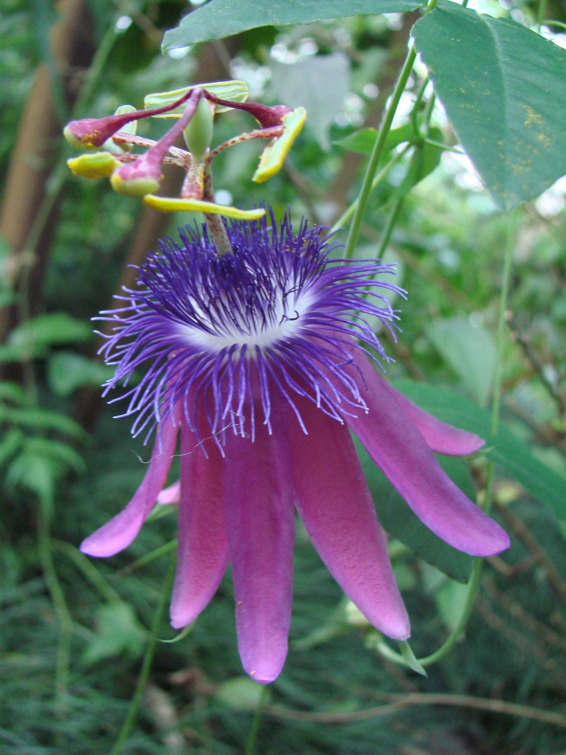 Jardin botanique de l'Université de Zurich (Suisse) : Passiflora loefgrenii F.A. Vitta